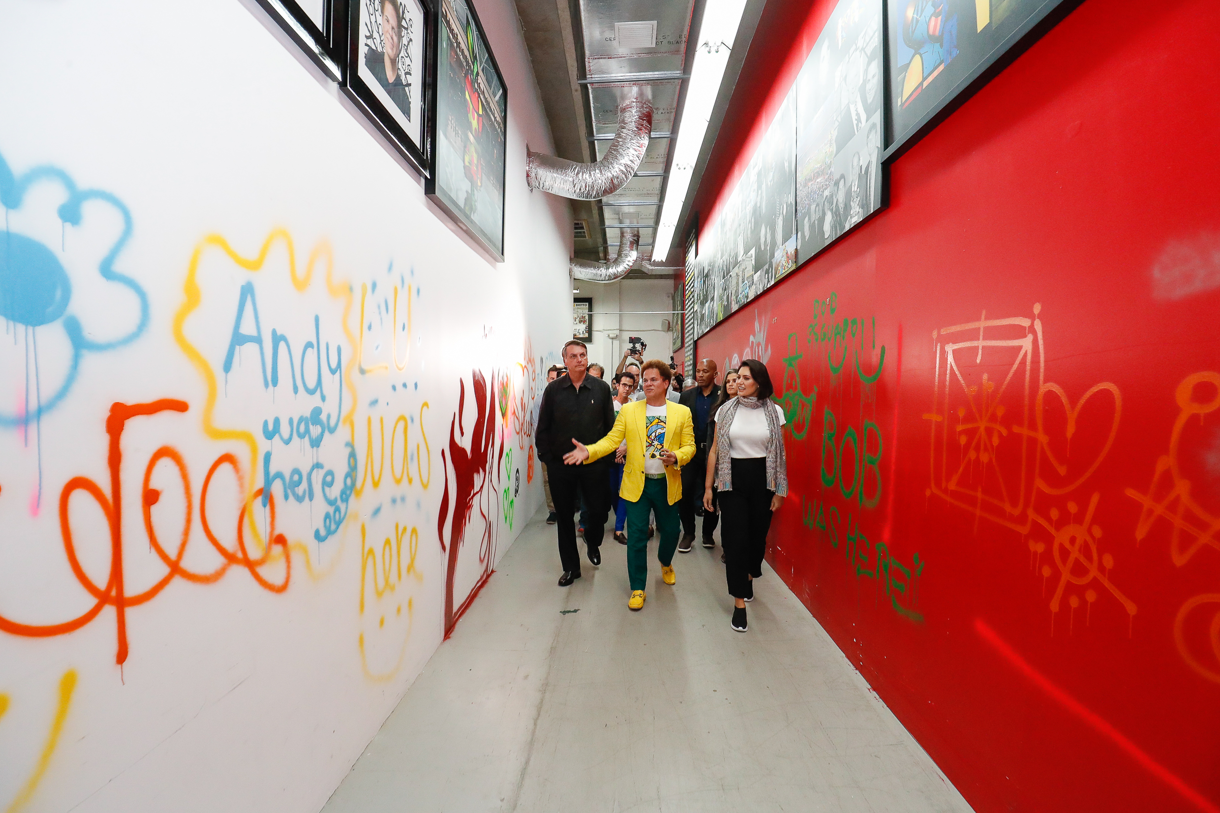 (Miami - Flórida, 08/03/2020) Presidente da República Jair Bolsonaro acompanhado da Primeira-Dama Michelle Bolsonaro, visitam o Estúdio do Artista Romero Britto.